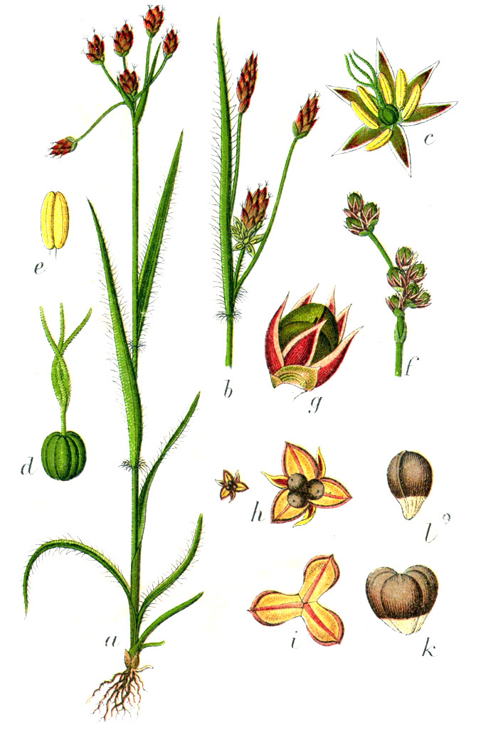 Luzula campestris (L.) DC. Original Caption Gemeines Hasenbrot, Luzula campestris